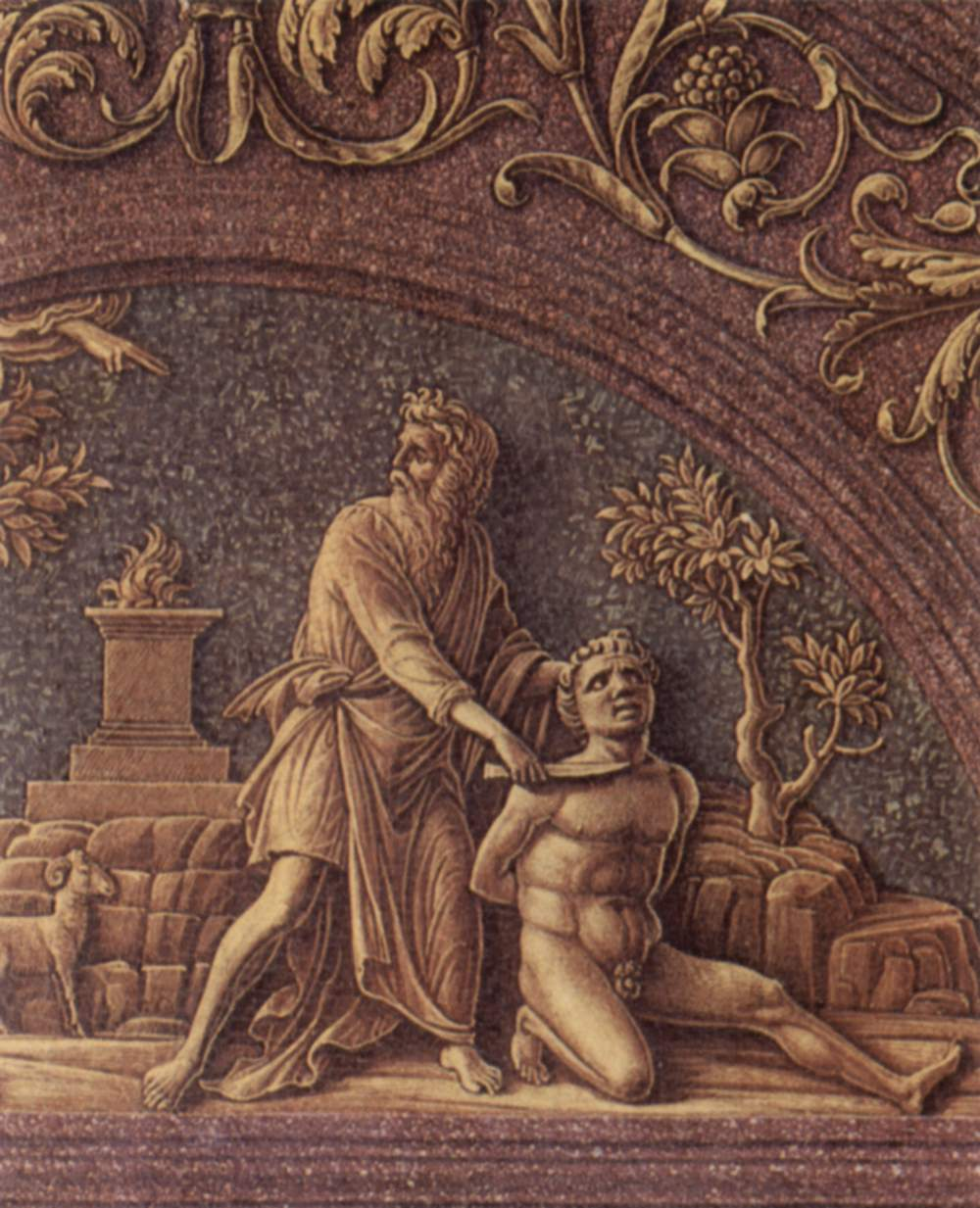 Altarretabel der Palastkapelle des Herzogs von Mantua